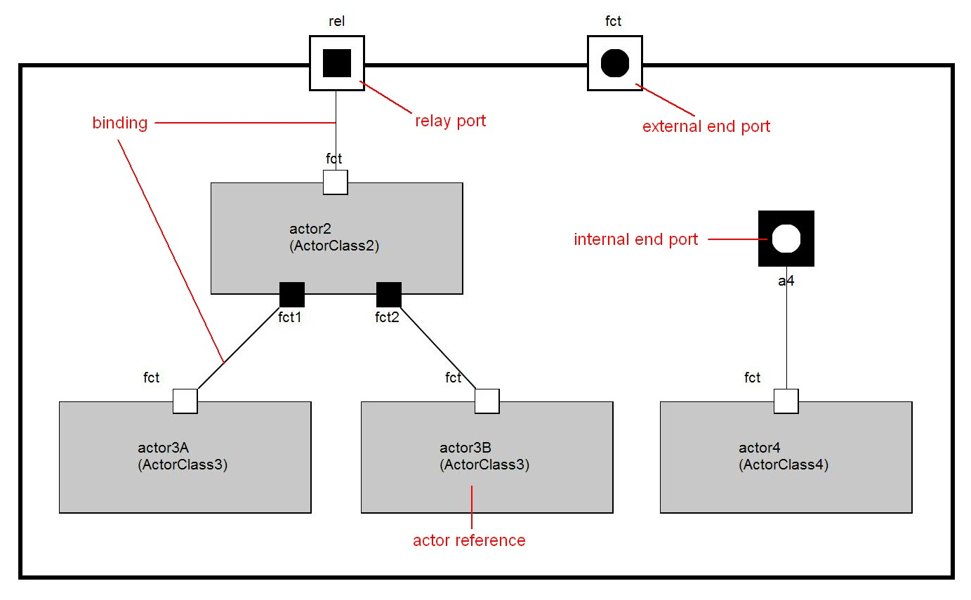 example of a ROOM structure diagram